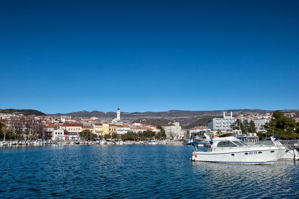 Crikvenica